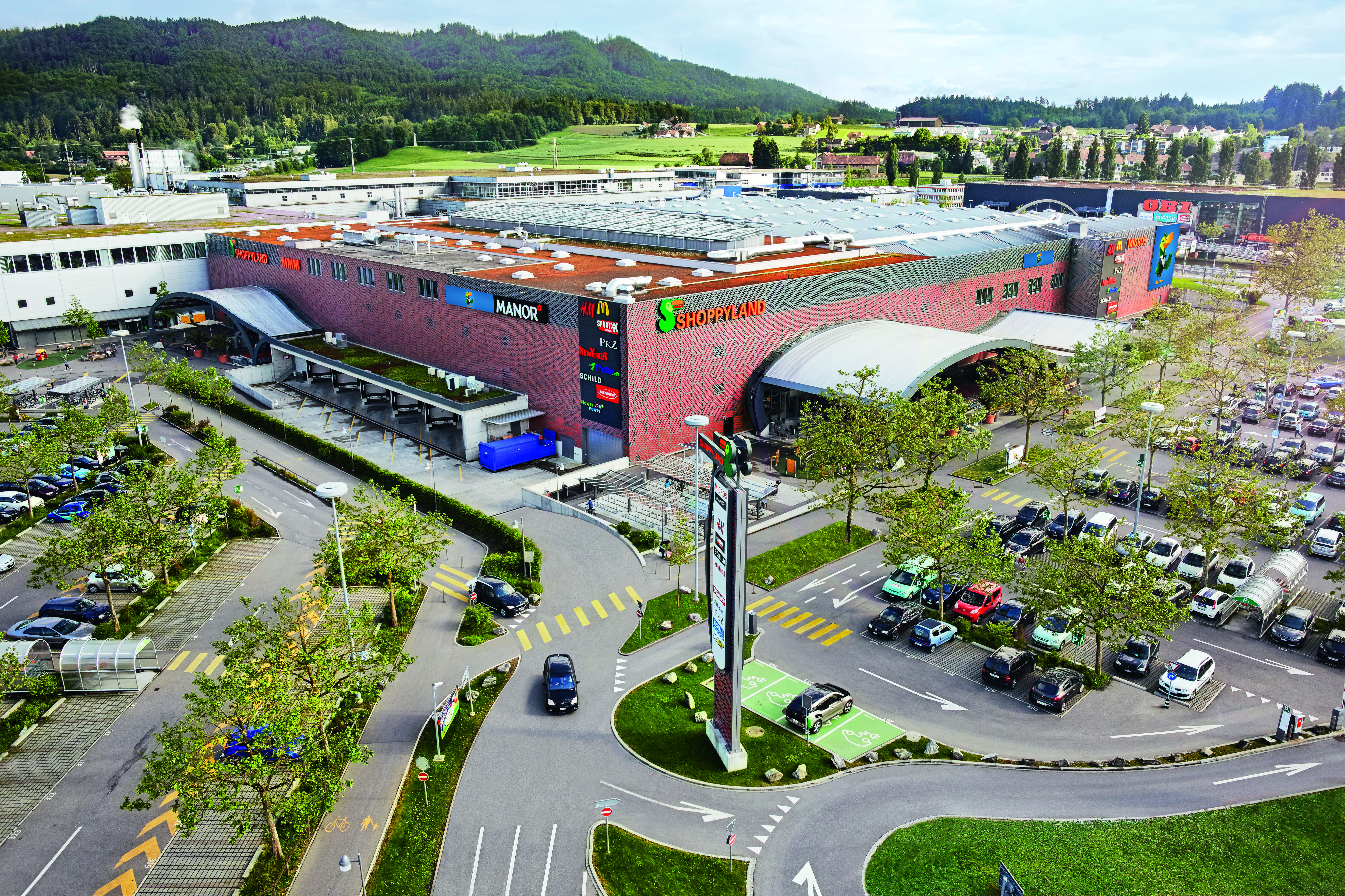 Aussenaufnahme des Shoppyland Schönbühl